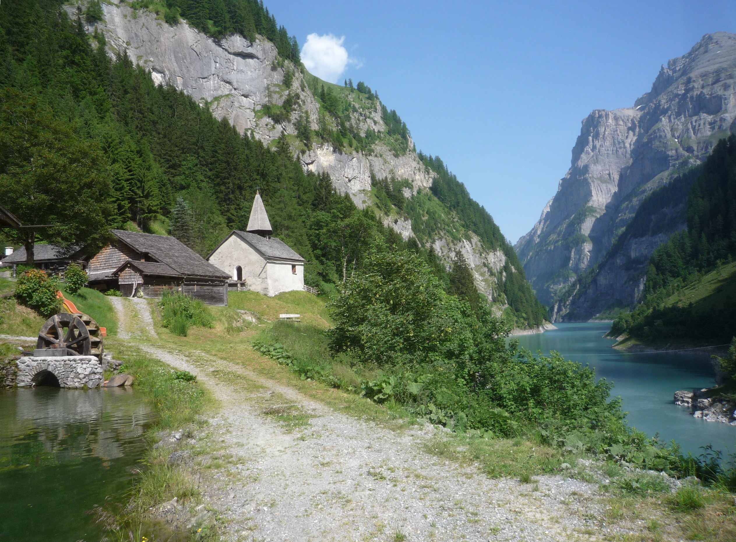 Weiler St. Martin am westlichen Seeende des Gigerwaldsees